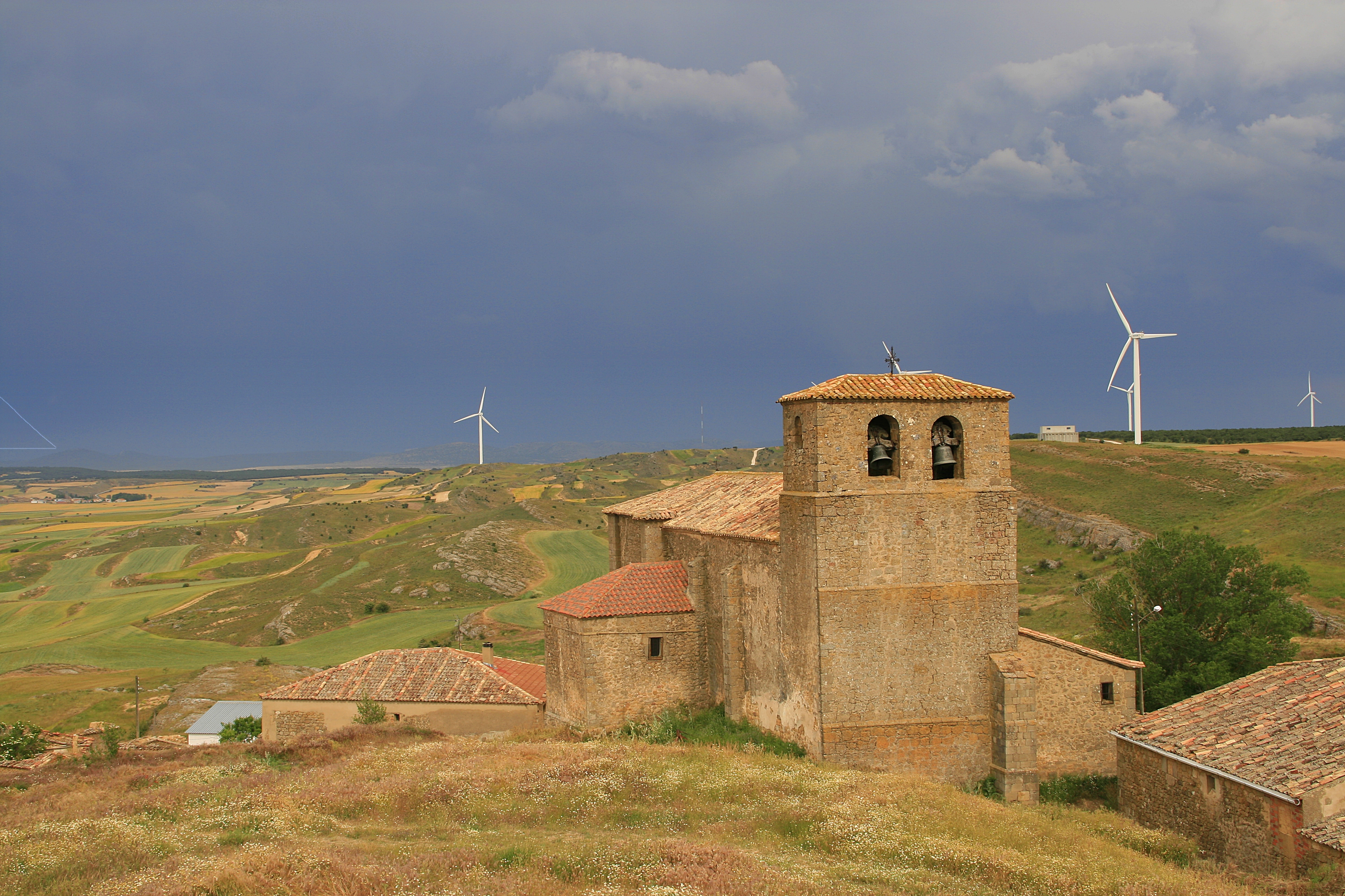 Castil de Tierra, Soria, España.